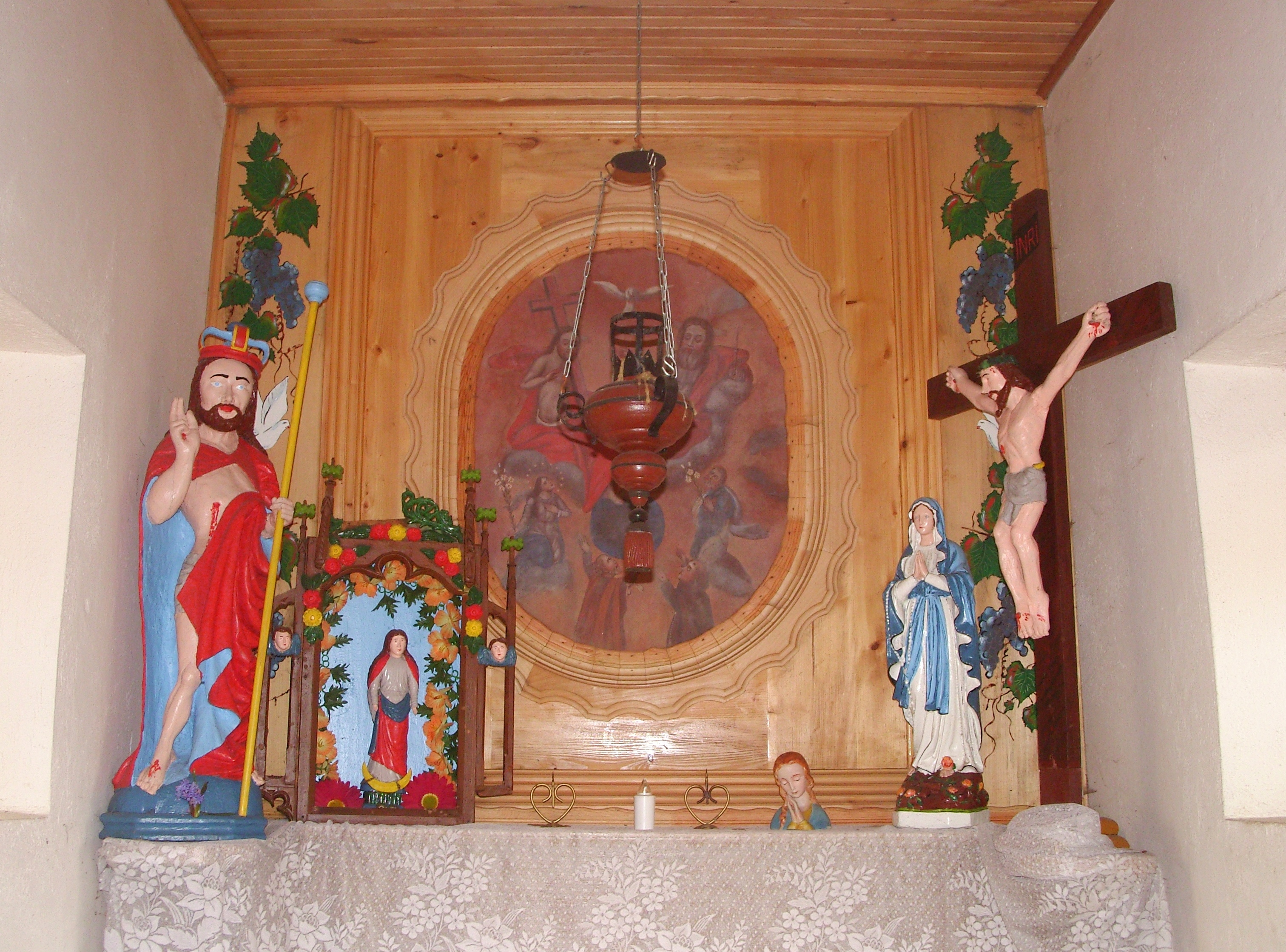 Ołtarz kapliczki w Racławicach, z zabytkowymi obiektami: późnogotycką rzeźbą Pana Jezusa Zmartwychwstałego, neogotyckim ołtarzykiem Niepokalanej NMP, krucyfiksem z końca XVIII wieku, drewnianą lampą i figurami współczesnymi